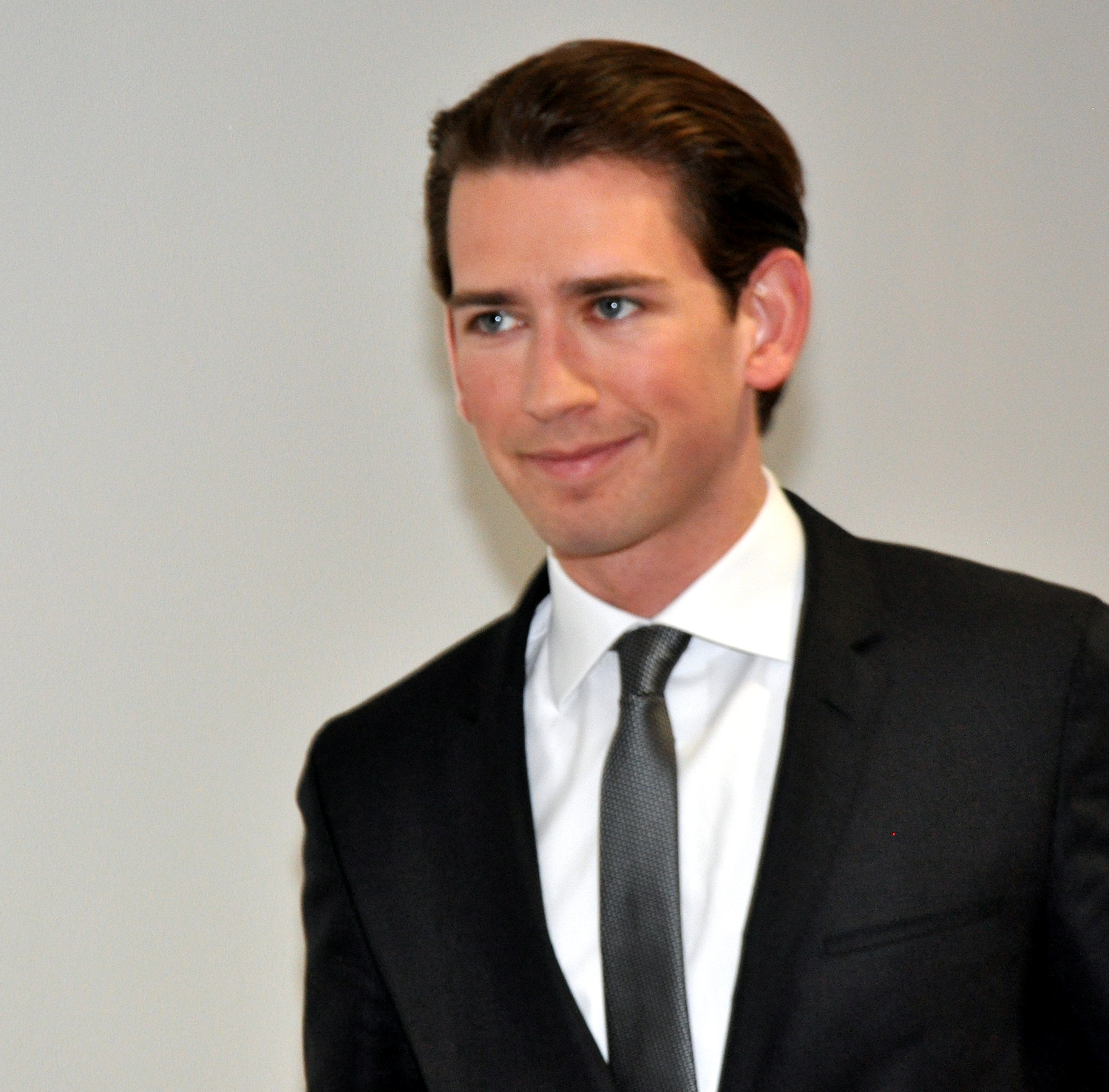 Sebastian Kurz 2016